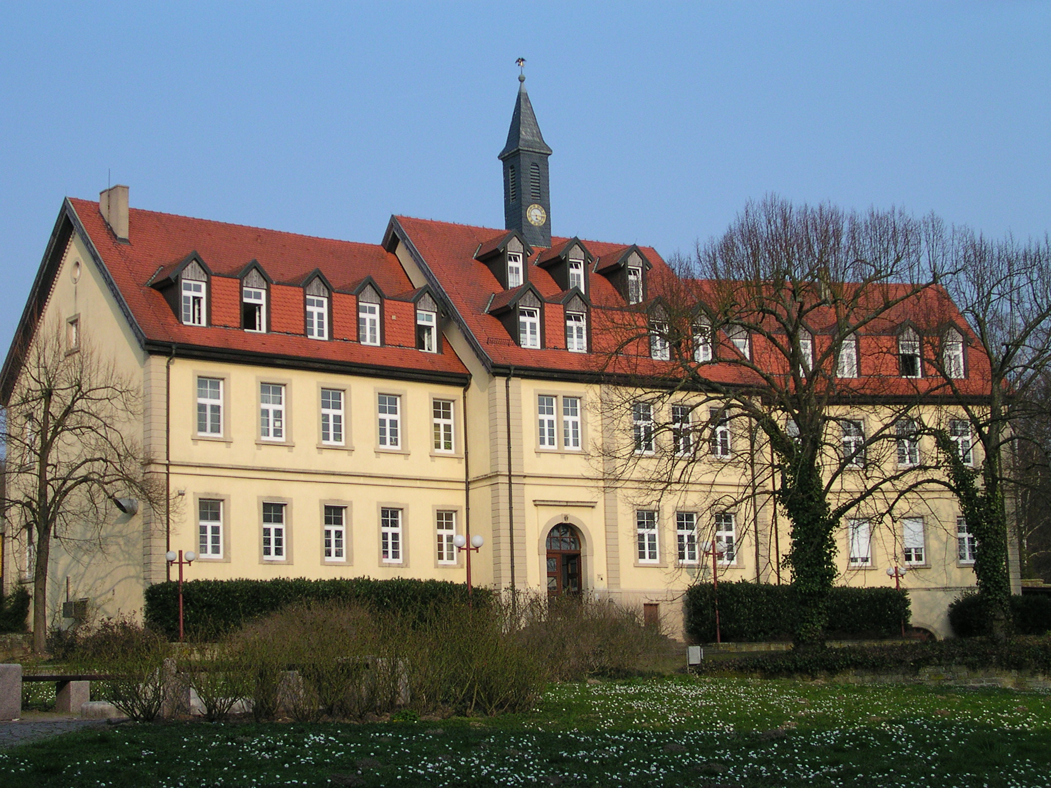 Sinsheim. Sunnisheimgebäude von Stift Sunnisheim